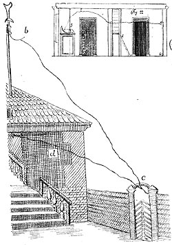 Рисунок М.В. Ломоносова, последний опыт Рихмана